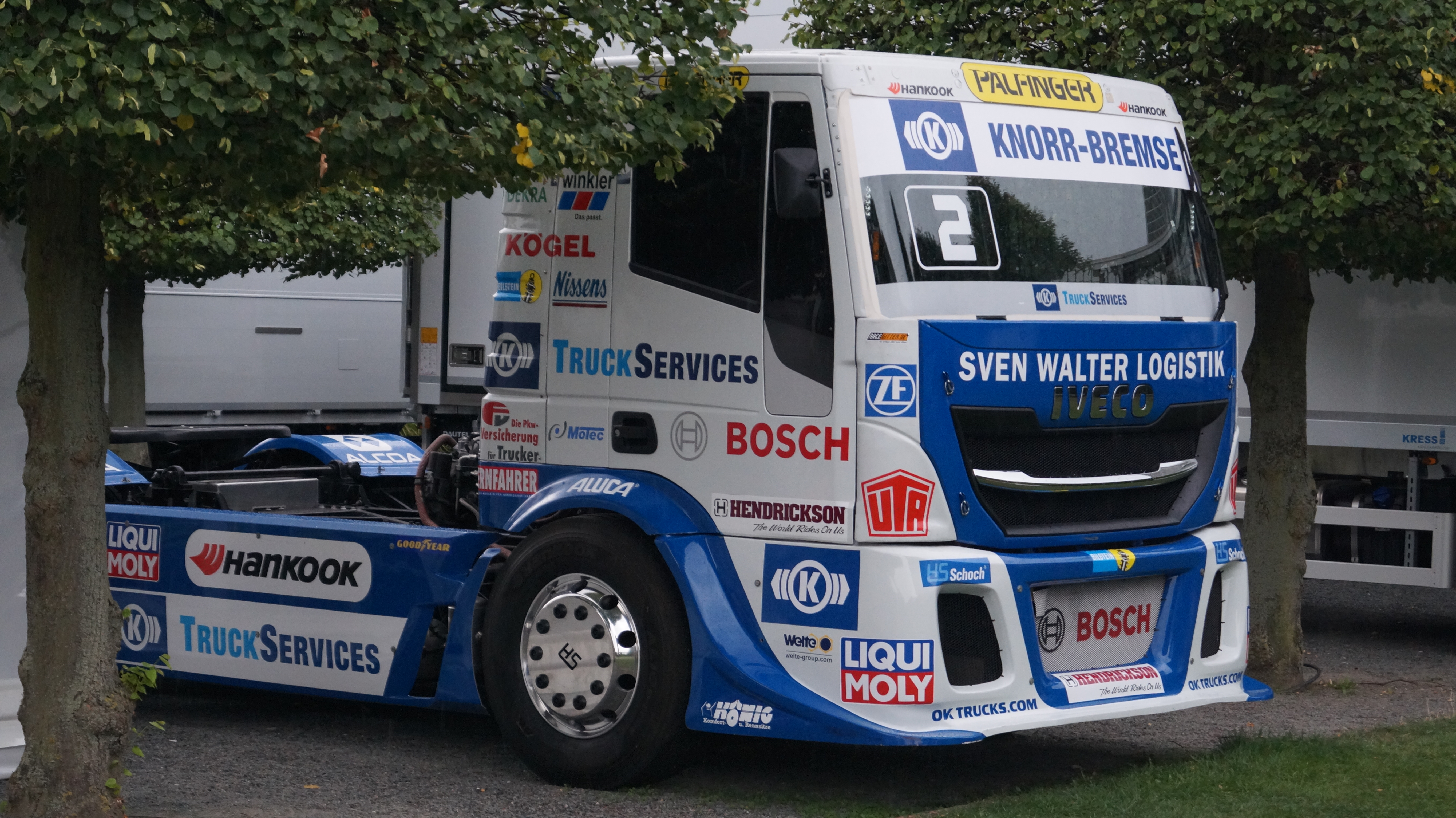 Schrägansicht der Front des Iveco Racing Trucks von Jochen Hahn aus der Saison 2018, ausgestellt auf der IAA 2018.